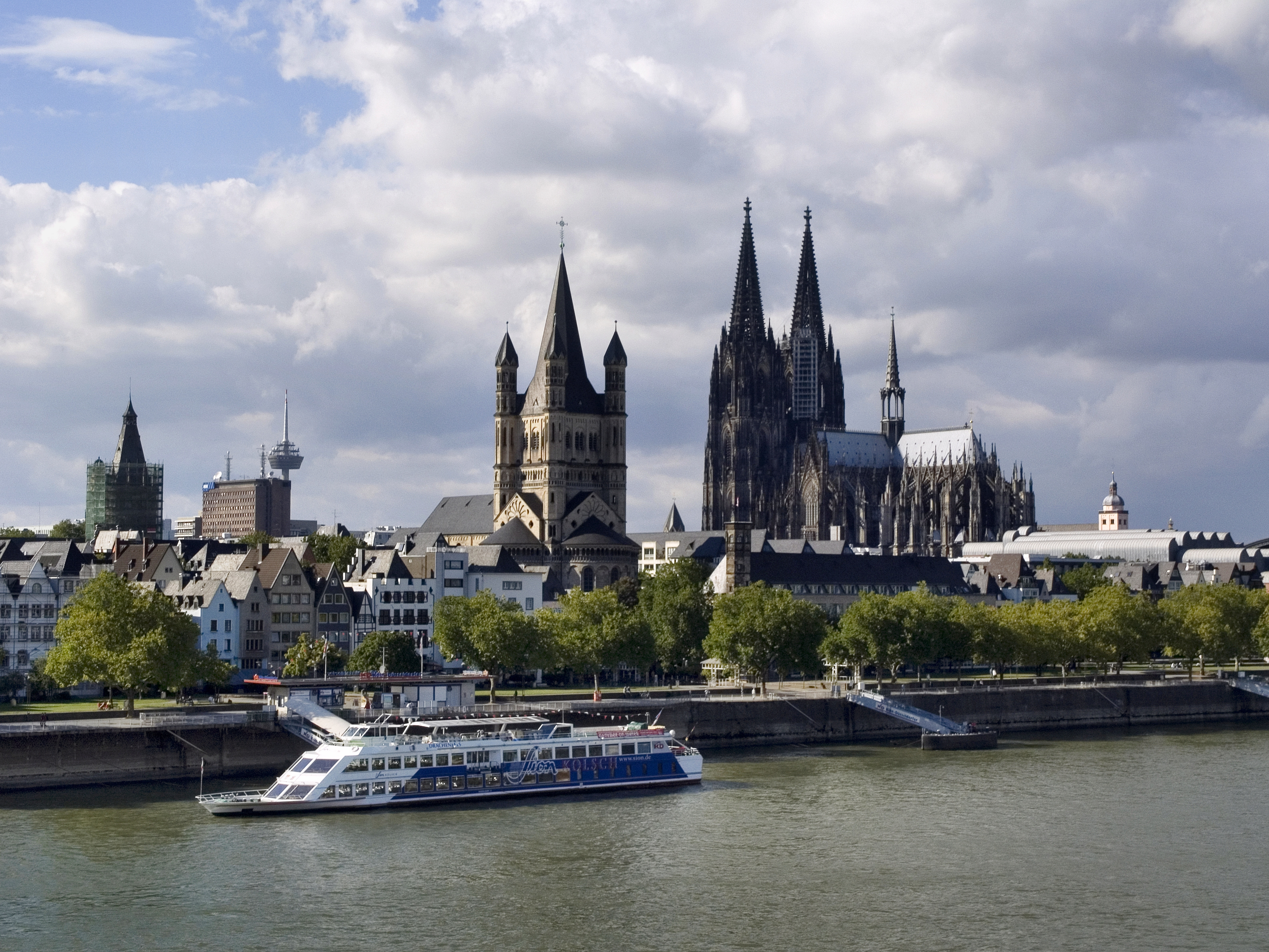 Северный Рейн-Вестфалия, Кёльн - вид на Кёльнский собор и церковь Святого Мартина с моста Дойц